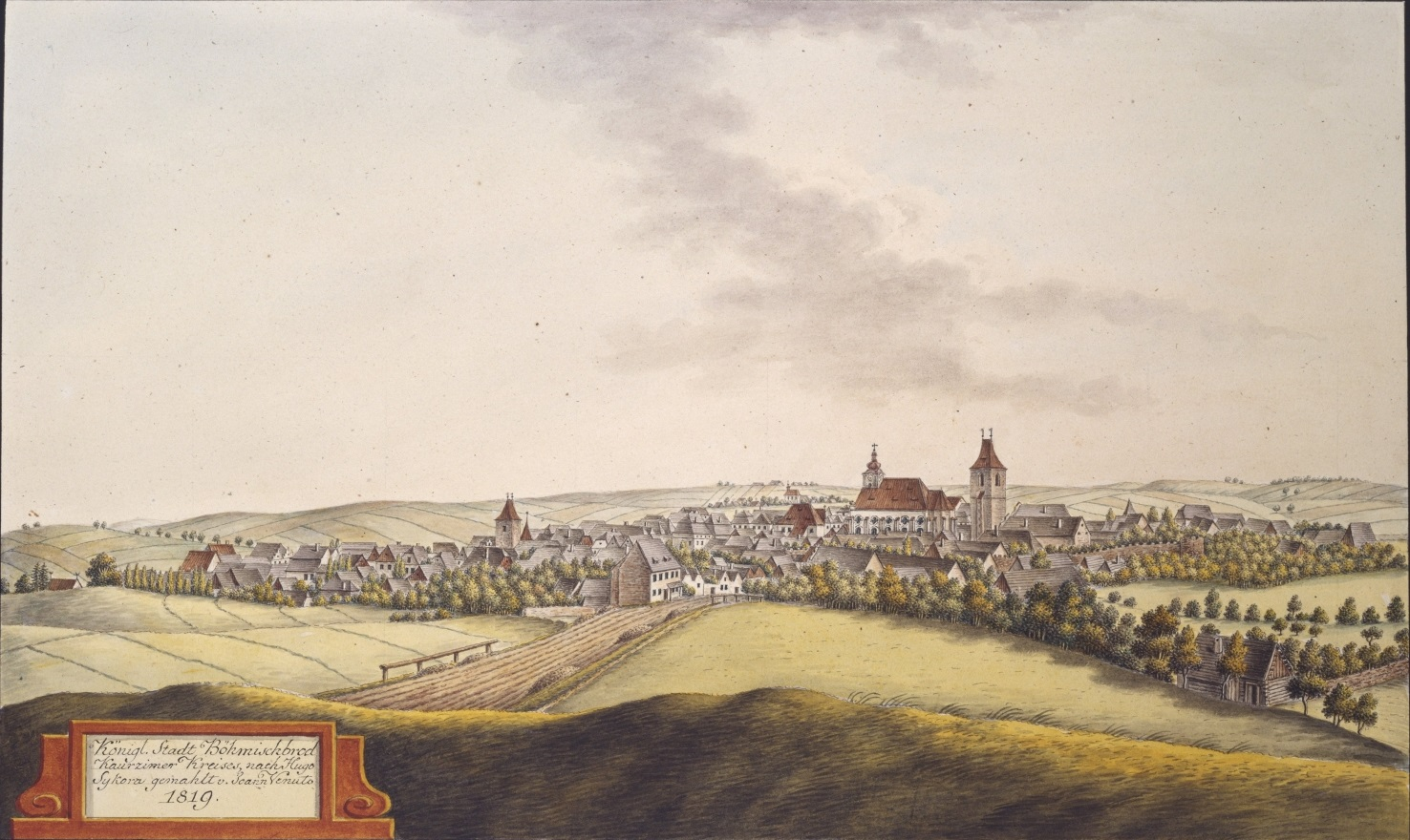 Český Brod. Königl. Stadt Böhmischbrod Kauřzimer Kreises, nach Hugo Sykora gemahlt v. Joann Venuto